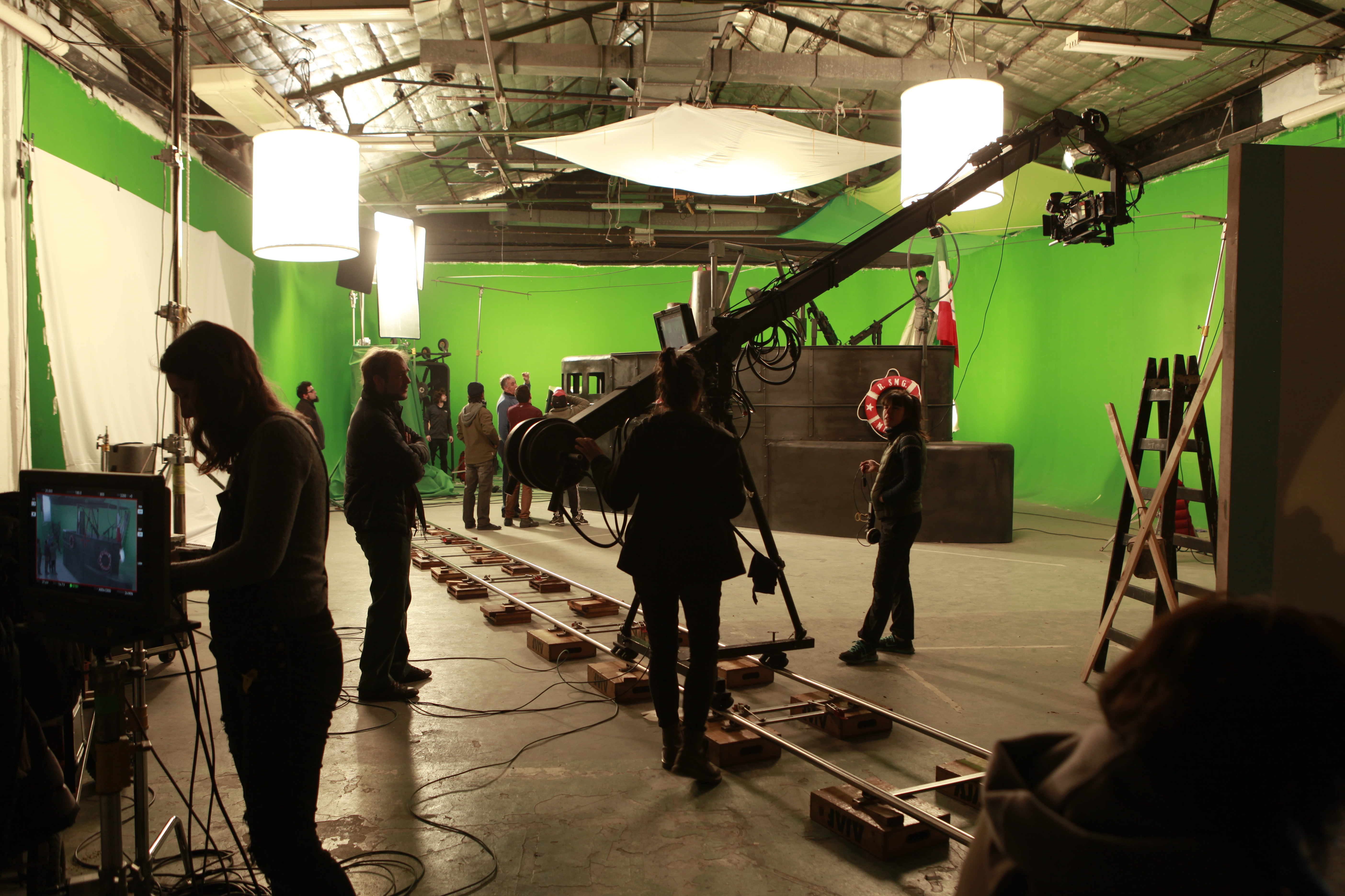 Backstage de la película Volviendo a casa de 2019